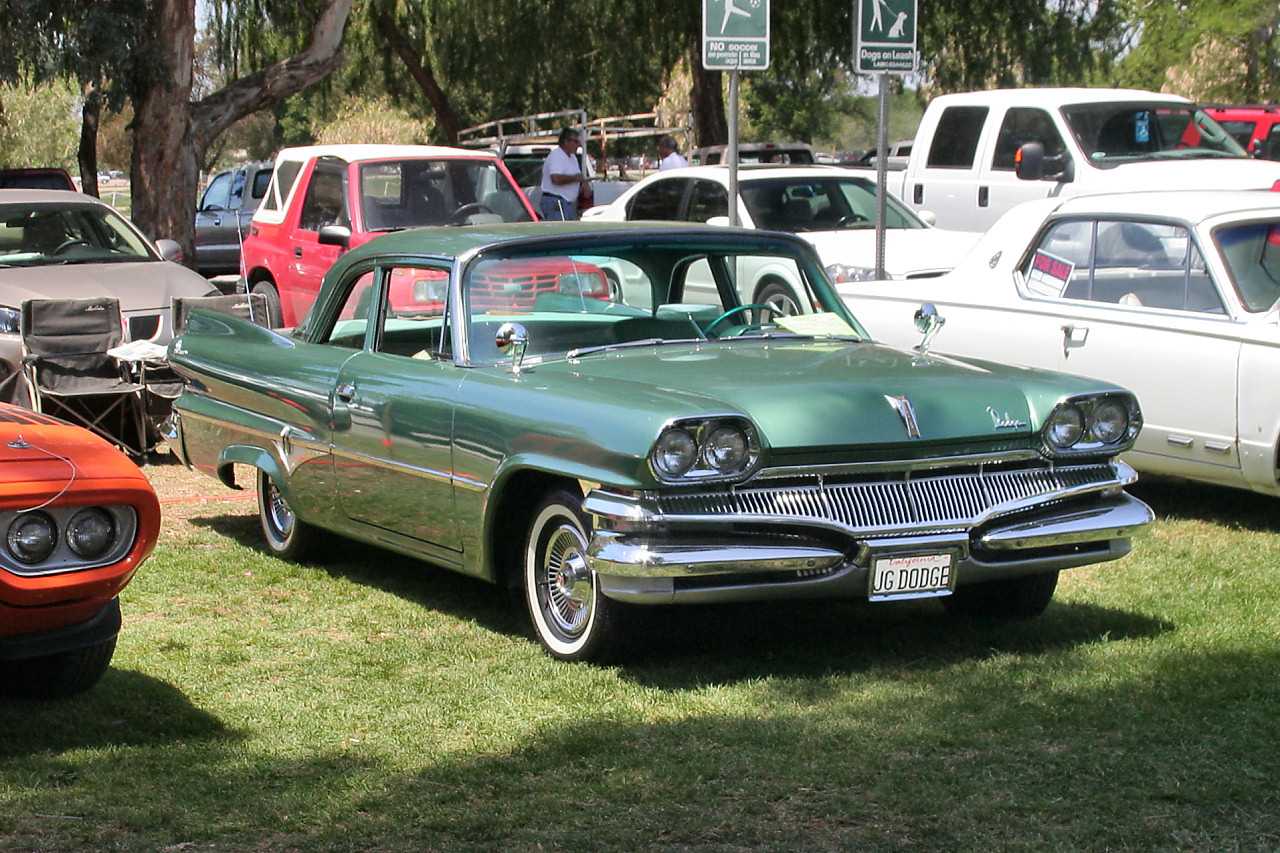 1960 Dodge Dart Pioneer 2d sdn - green - fvr2